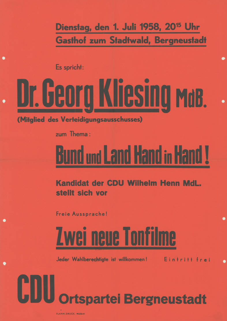 ... Es spricht: Dr. Georg Kliesing MdB. (Mitglied des Verteidigungsausschusses) zum Thema: Bund und Land Hand in Hand! Kandidat der CDU Wilhelm Henn MdL. stellt sich vor Freie Aussprache Zwei neue Tonfilme ... CDU Ortspartei Bergneustadt Plakatart: Ankündigungsplakat Auftraggeber: CDU Ortspartei Bergneustadt Drucker_Druckart_Druckort: Flamm-Druck, Waldbröl Objekt-Signatur: 10-009 : 410 Bestand: Landtagswahlplakate Nordrhein-Westfalen (10-009) GliederungBestand10-18: Landtagswahlplakate Nordrhein-Westfalen (10-009) » Landtagswahl am 6.7.1958 » Ankündigungsplakate Lizenz: KAS/ACDP 10-009 : 410 CC-BY-SA 3.0 DE